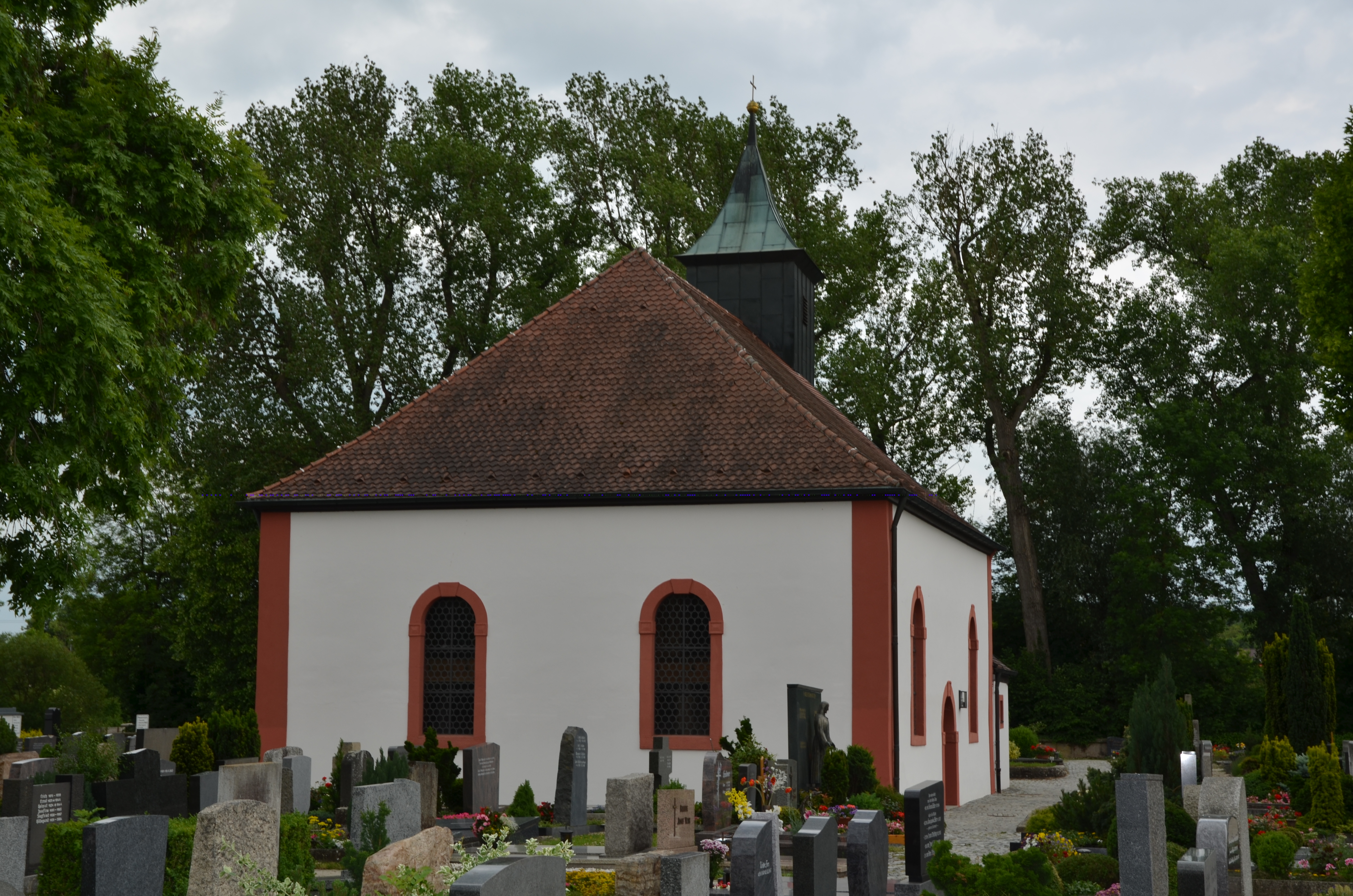 Friedhofskirche Zur Himmelfahrt Christi in Neustadt an der Aisch